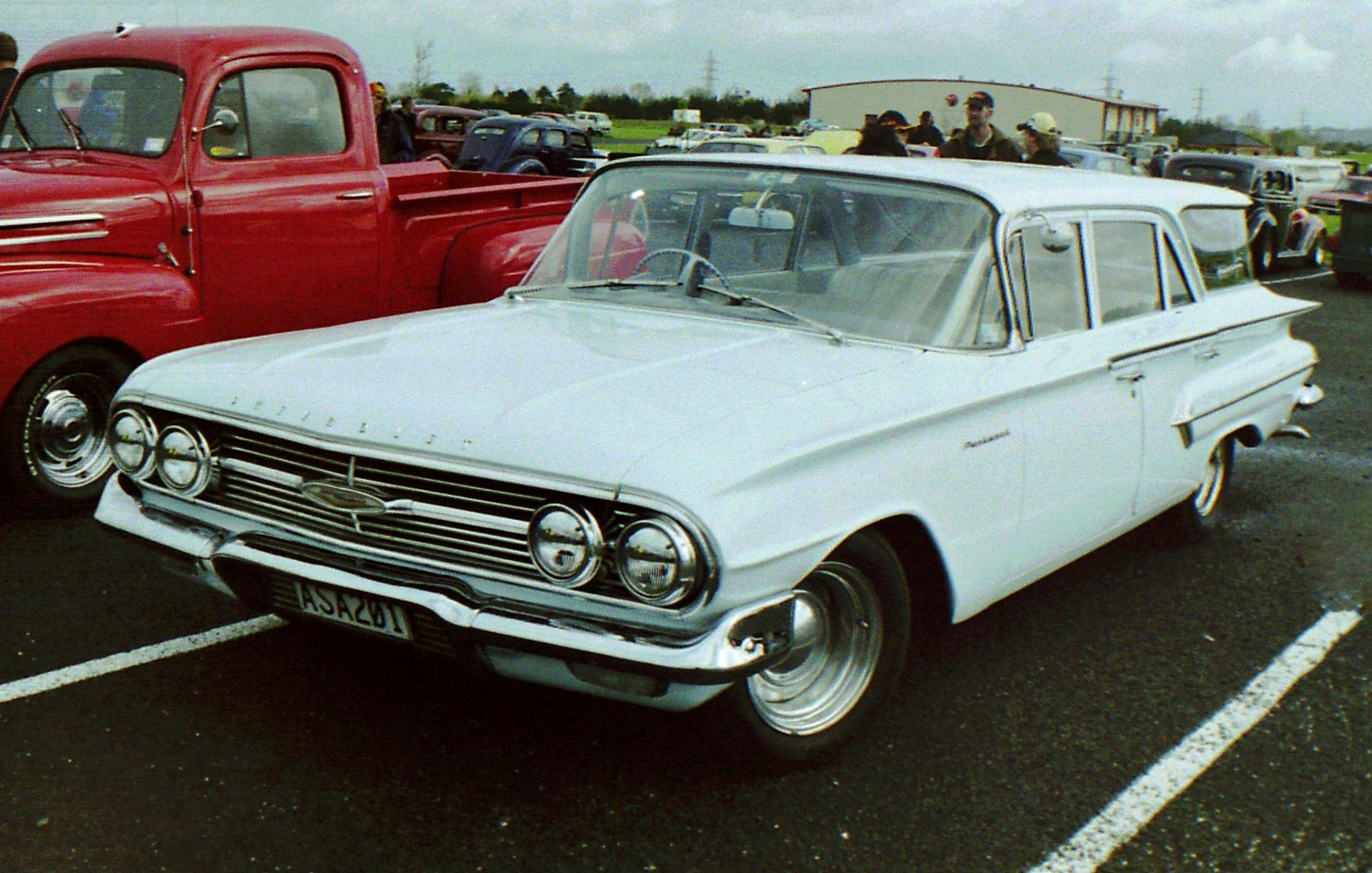 1960 Chevrolet Wagon